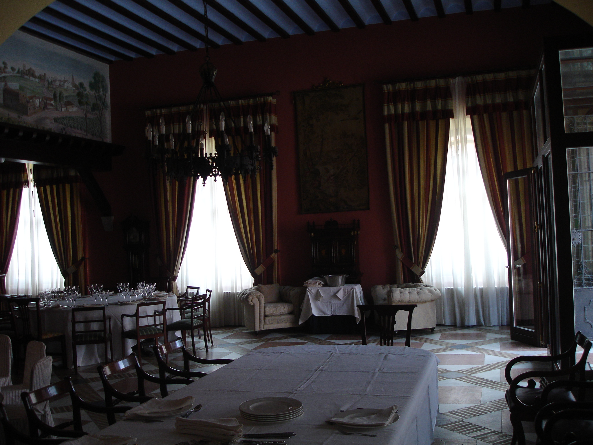 Valdivia in Jerez, Andalusia (Spain)